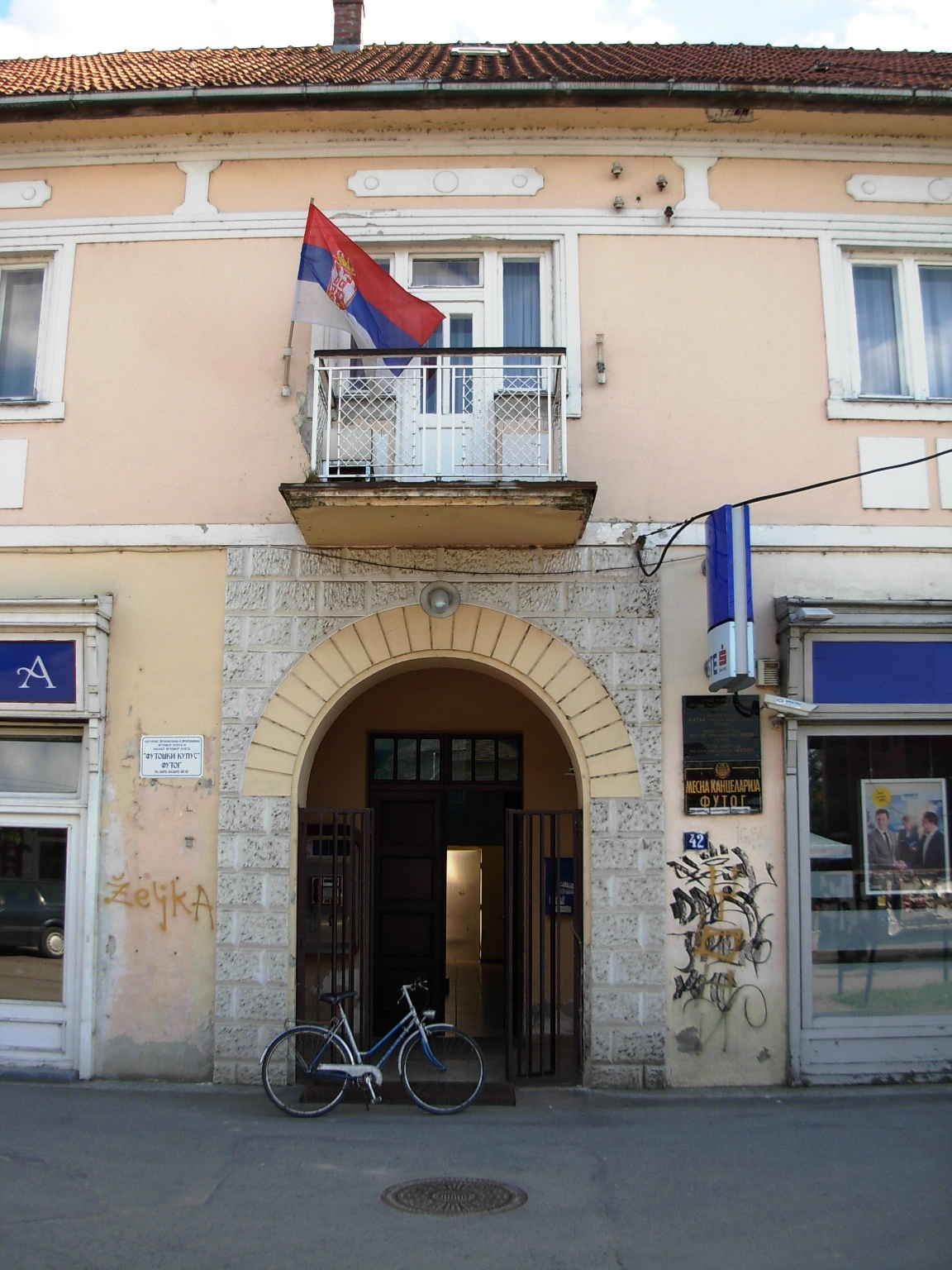 Mesna kancelarija u Futogu.